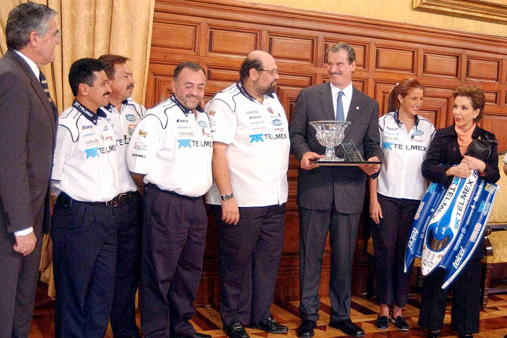 Carlos Kuri entrega Copa de Campeón Americano al Presidente Vicente Fox, Palacio Nacional, México 2003